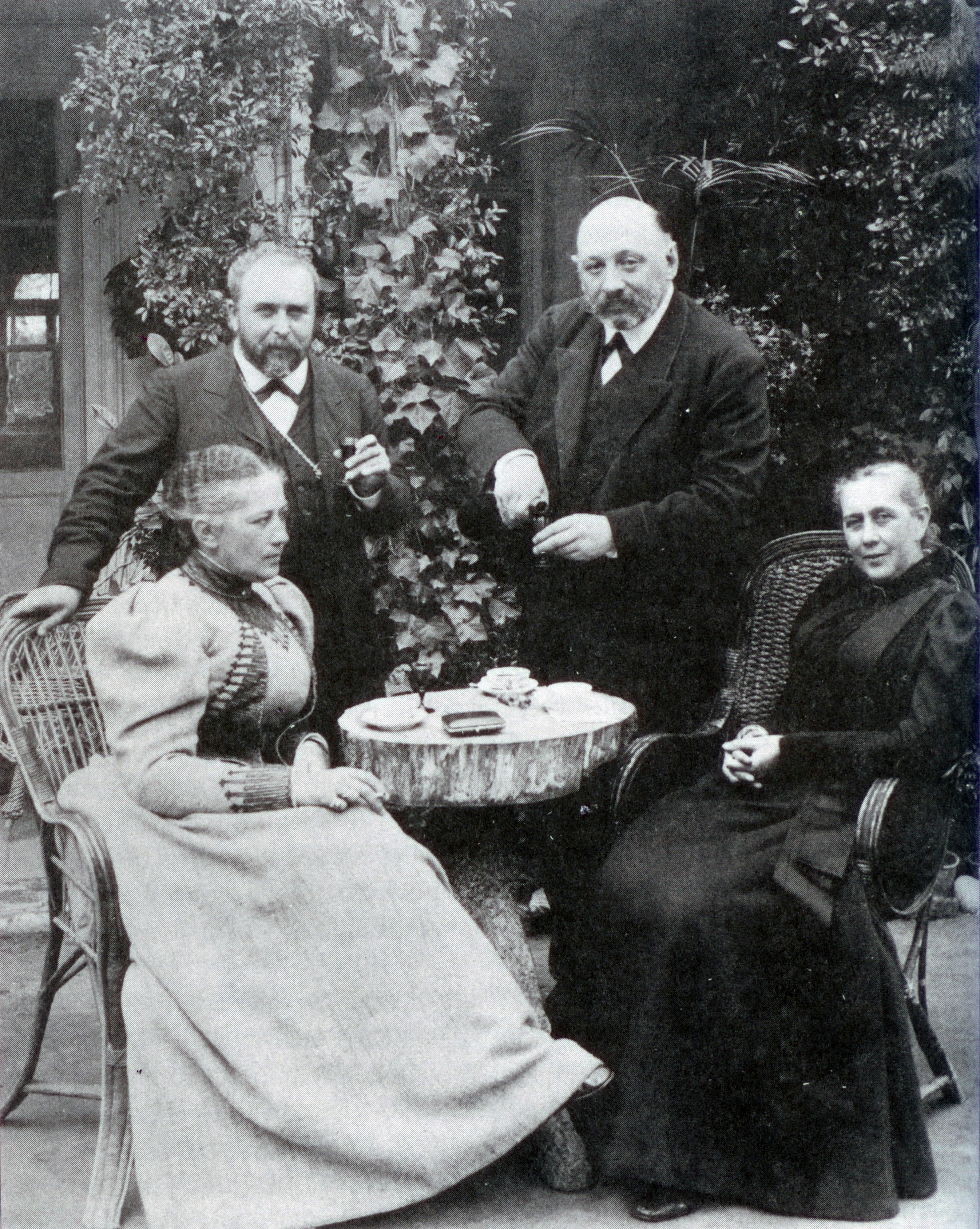 Александра Павловна Сипягина(1851-1929), ур. Вяземская и Дмитрий Сергеевич Сипягин, граф Сергей Дмитриевич Шереметев и Екатерина Павловна Шереметева (1849-1929), ур. Вяземская.